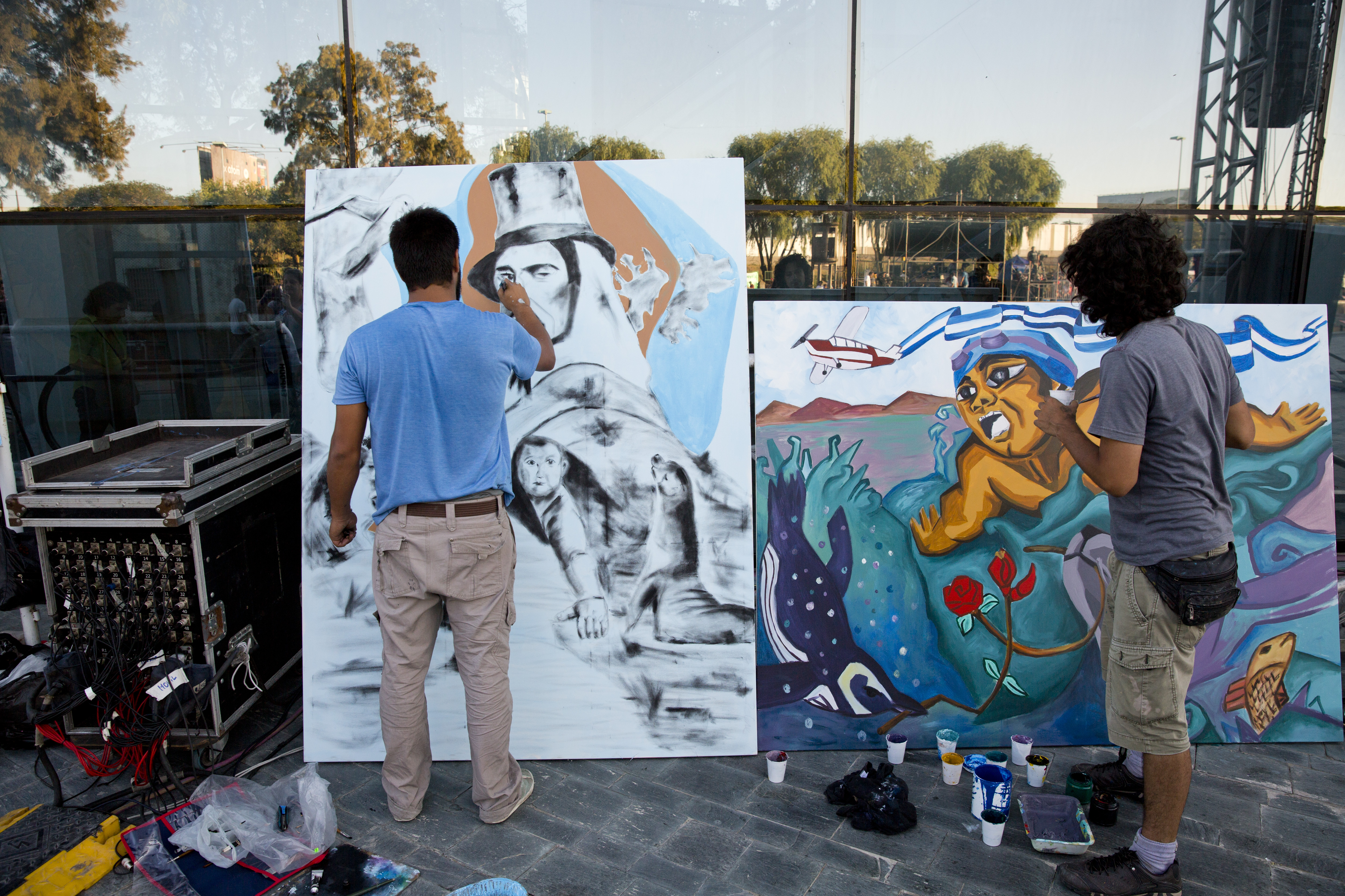 Buenos Aires, 2 de abril de 2015 – El Ministerio de Cultura de la Nación conmemoró el Día del Veterano y de los Caídos en la Guerra de Malvinas con el encuentro "Arte por la Paz" en el Museo Malvinas e Islas del Atlántico Sur, con las actuaciones de Raúl Porchetto, León Gieco, Fabiana Cantilo y más invitados. Fotos: Mauro Rico/ Ministerio de Cultura de la Nación